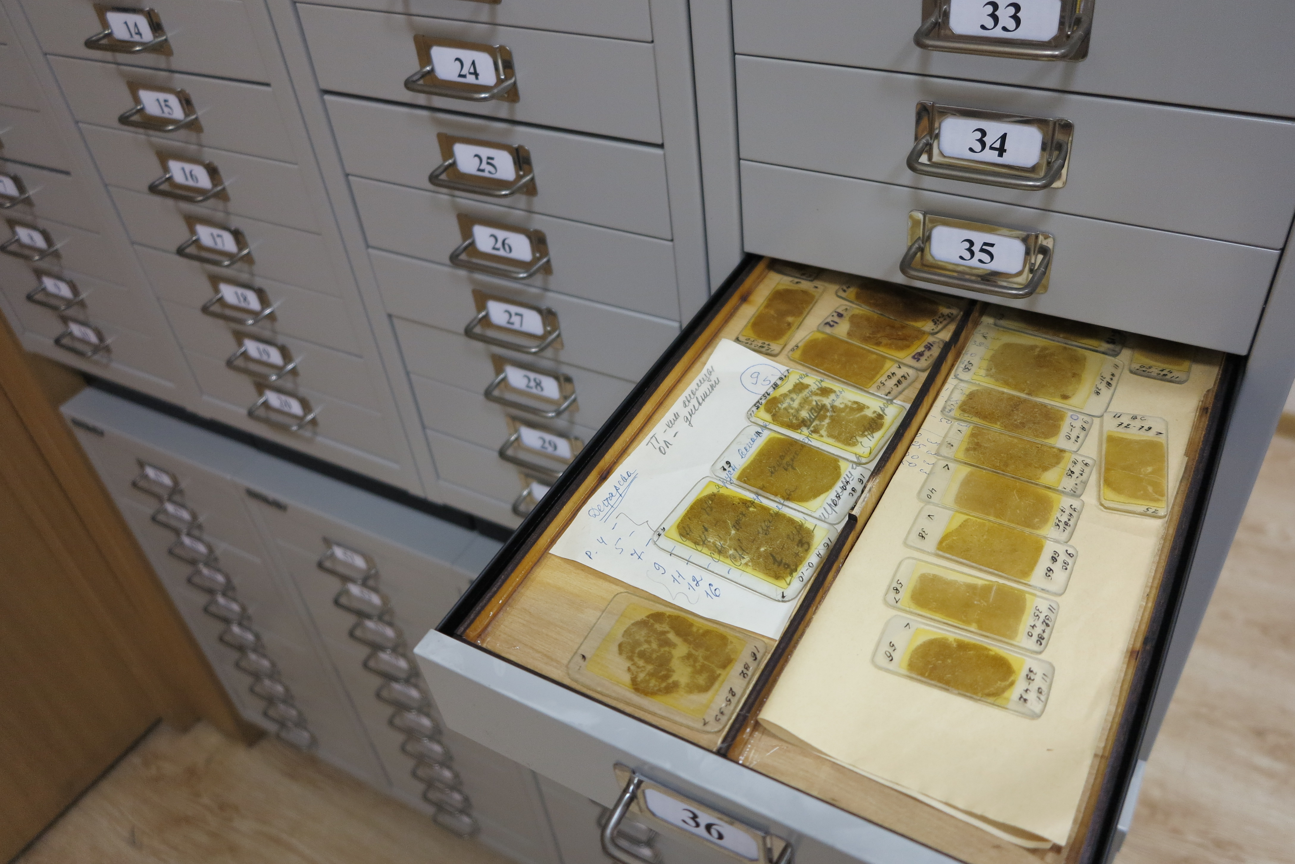 Почвенные шлифы с сопроводительной информацией